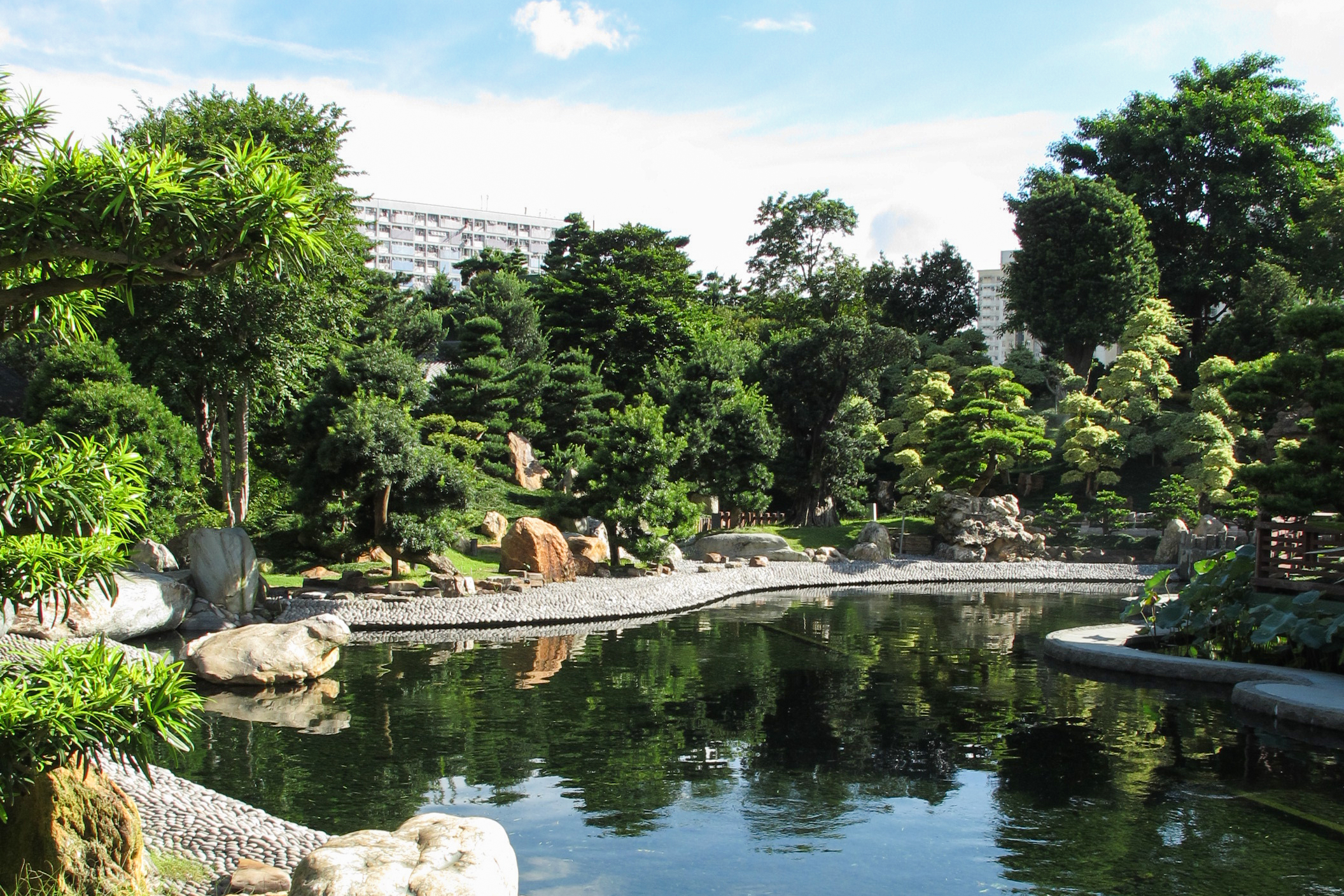 Nan Lian Garden Pond